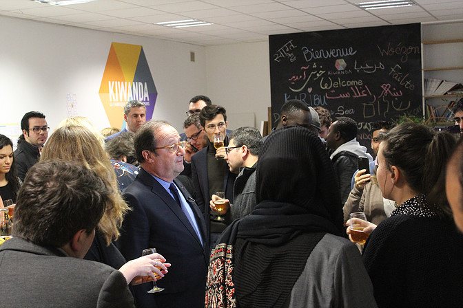 Visite de François Hollande à Kiwanda le 09 mars 2018.